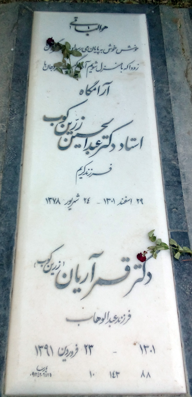 آرمگاه عبدالحسین زرین‌کوب و قمر آریان- قطعه هنرمندان بهشت زهرا